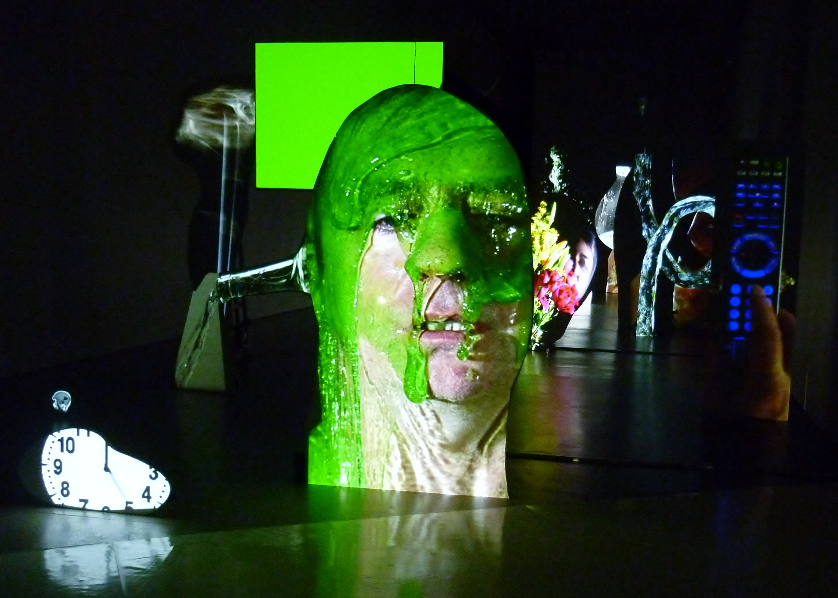 Exposición "Face to Face" de Tony Oursler en el ARoS, Aarhus, Dinamarca.